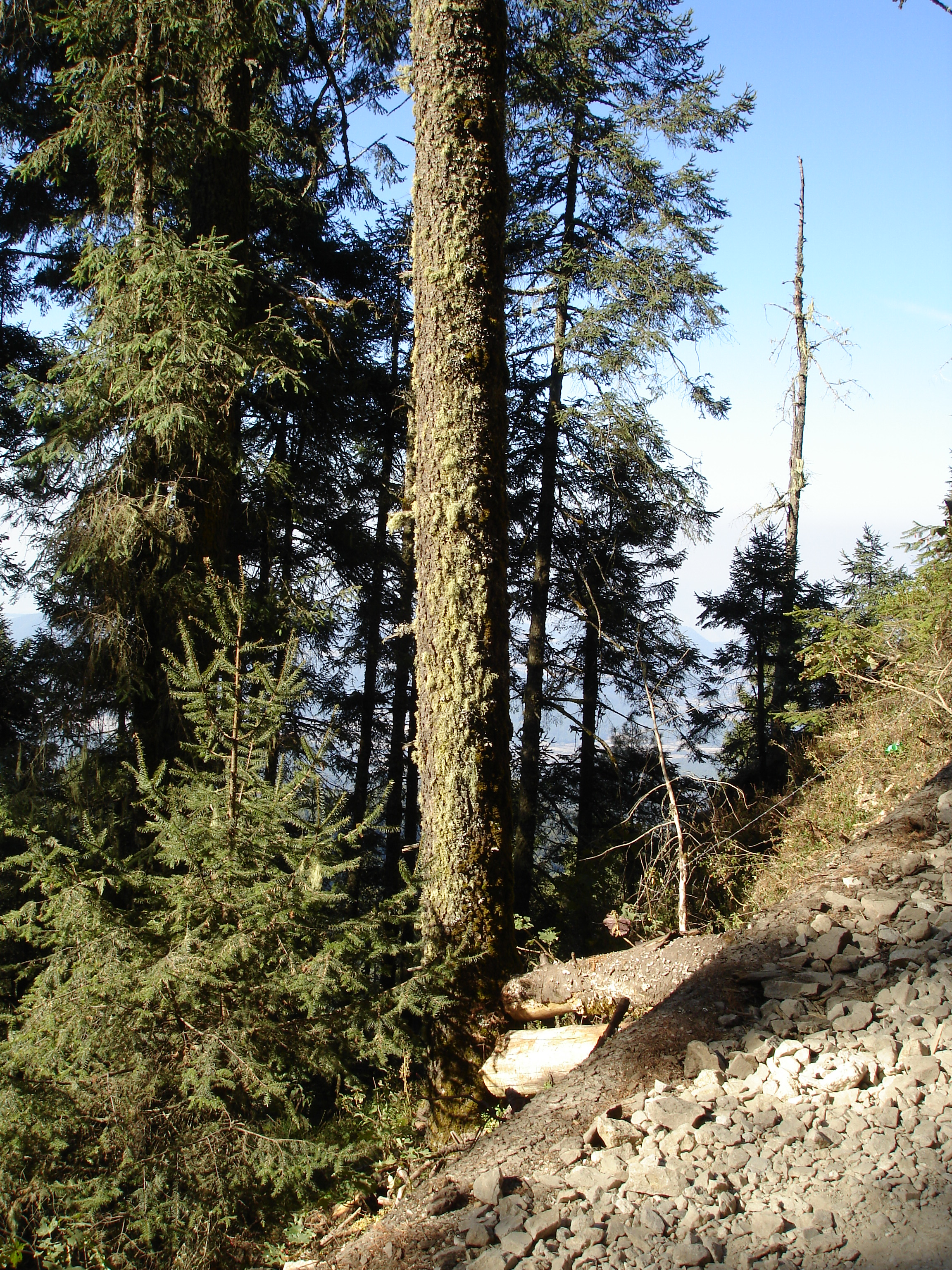 Sacred Fir Abies religiosa, Chincua Monarch Sanctuary, Angangueo, Michoacán, Mexico